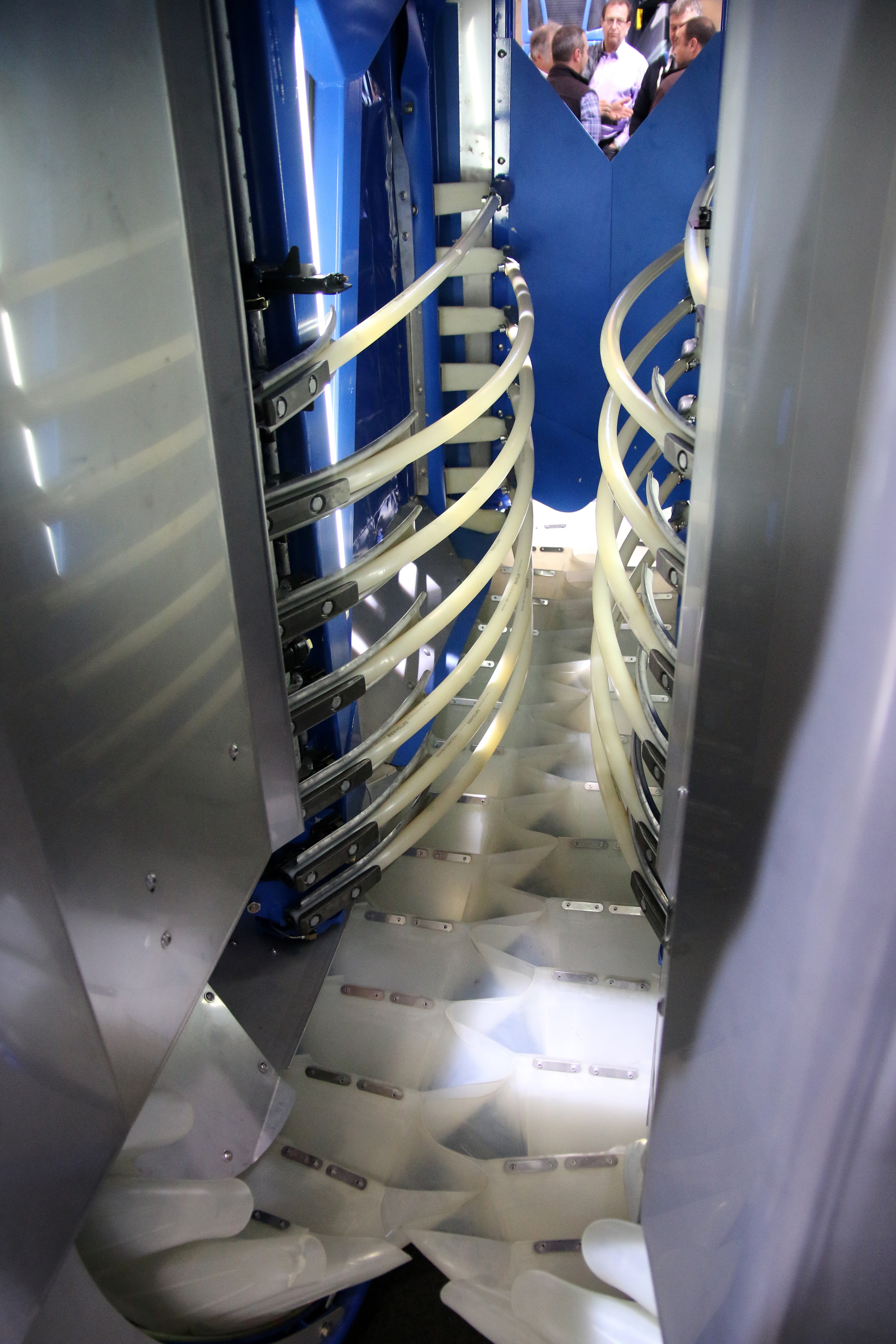 de